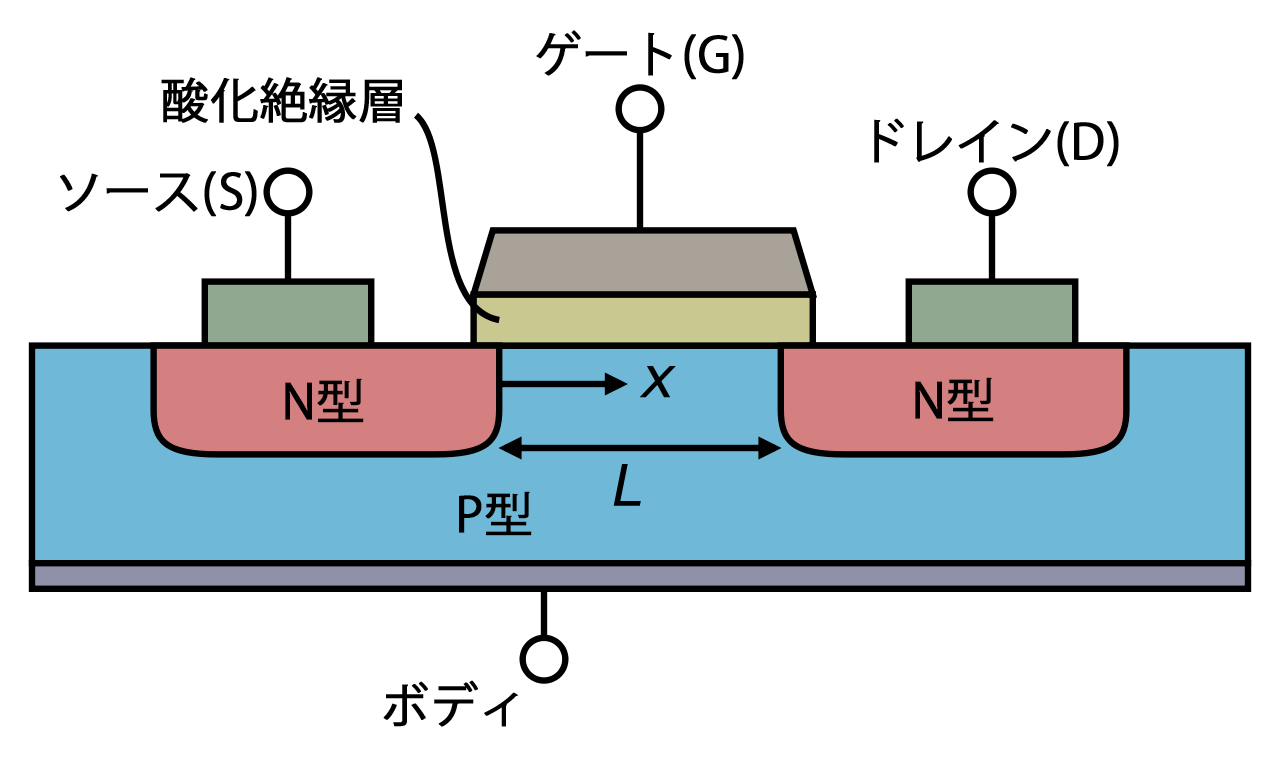 N型MOSFETの説明図(日本語)